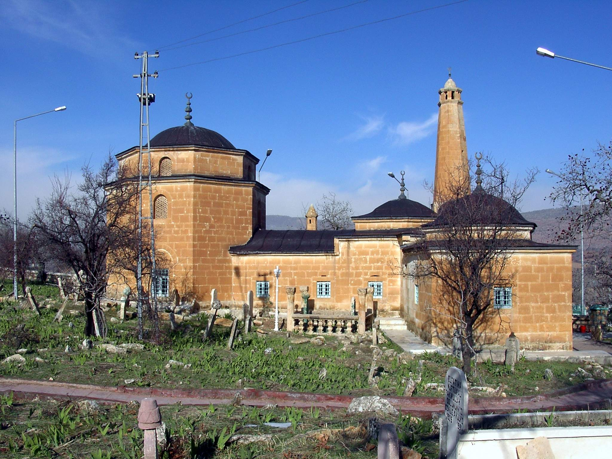 Ibrahim Hakkı shrine in Siirt